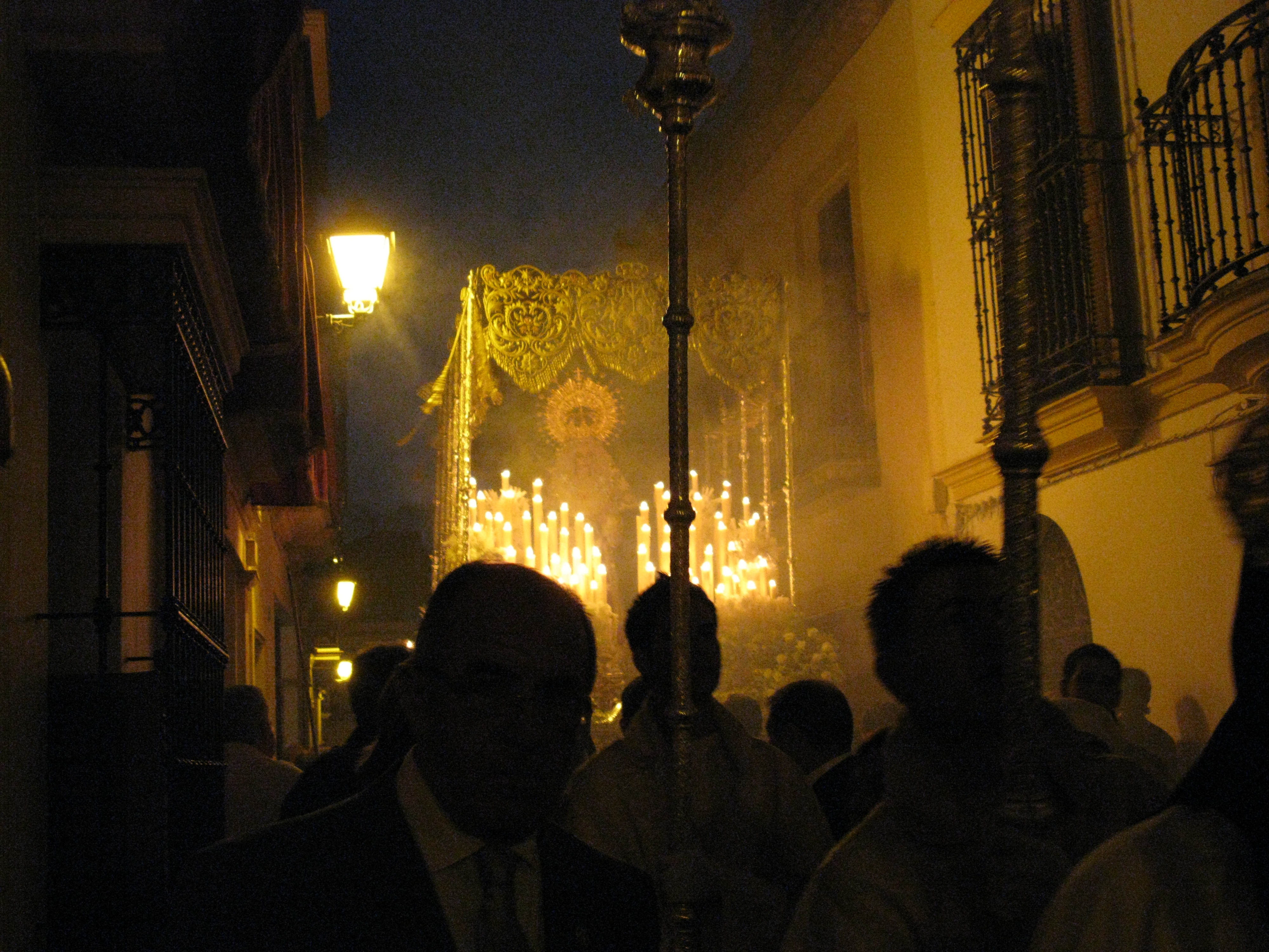 Hermandad de la Quinta Angustia en Utrera, (Sevilla, España). Noche del Domingo de Ramos, 5 de abril de 2009. Imagen de Nuestra Señora de los Ángeles, bajo palio, es talla de Juan Ventura, remodelada en 1996.